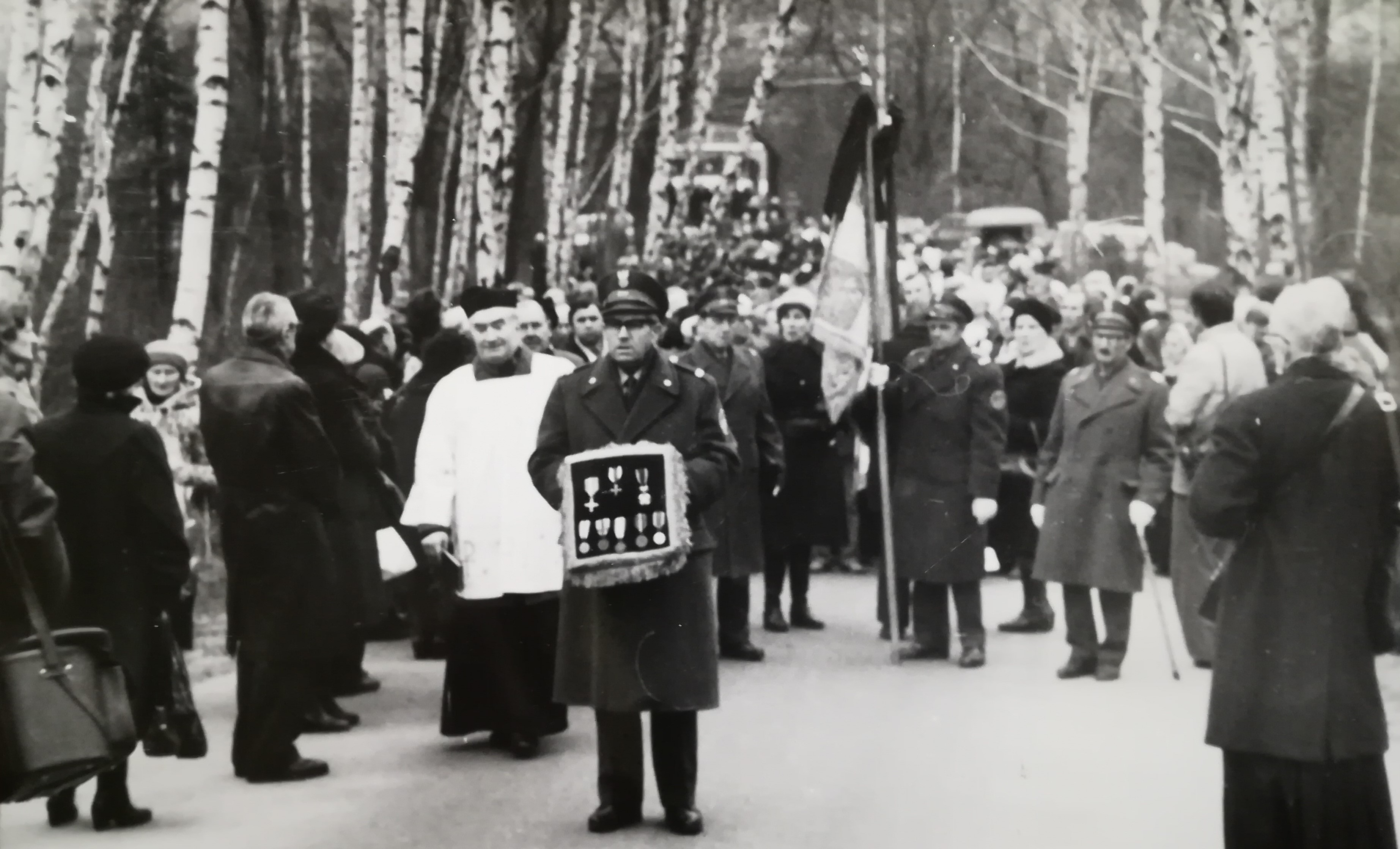 Pogrzeb ojca Czesława Białka na cm. Miłostowo w Poznaniu. Zmarł 1984-03-15.